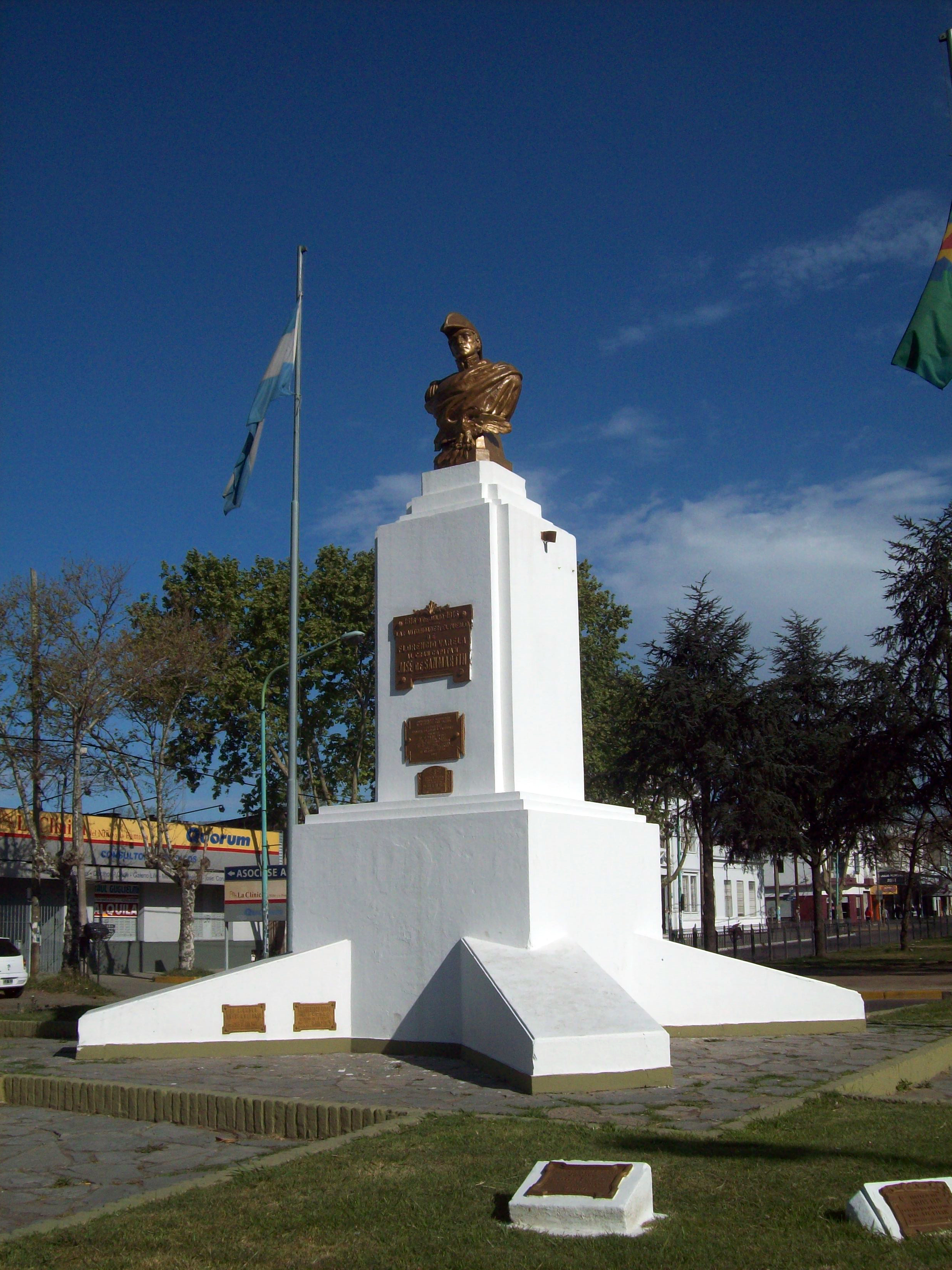 Monumento a José de San Martín en la Avenida que lleva su nombre.